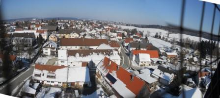 Panoramabild von Anhausen Nord